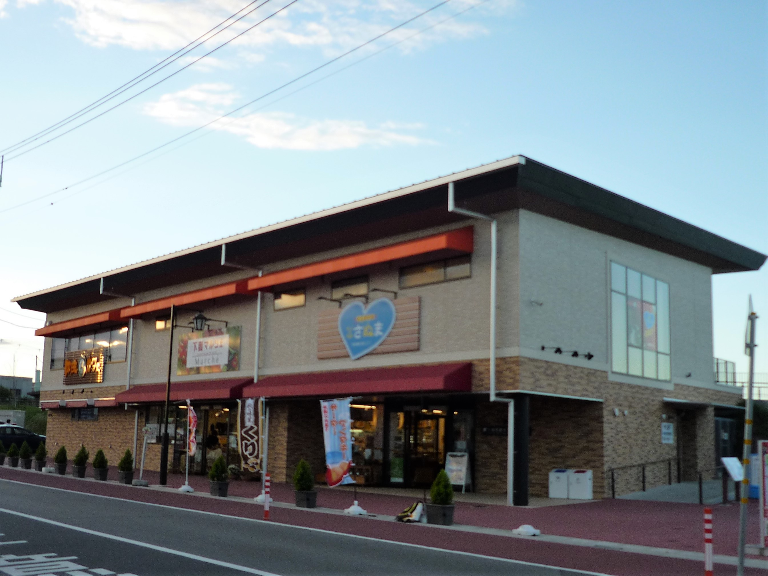 下妻市観光交流センター さん歩の駅 サン・SUN さぬま（下妻市砂沼新田）